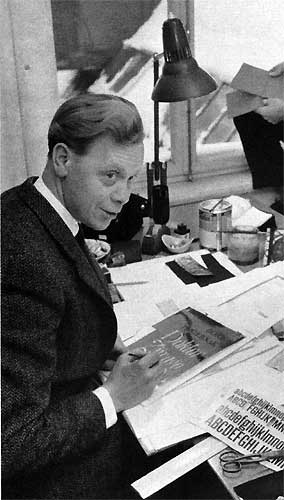 Vidar Forsberg